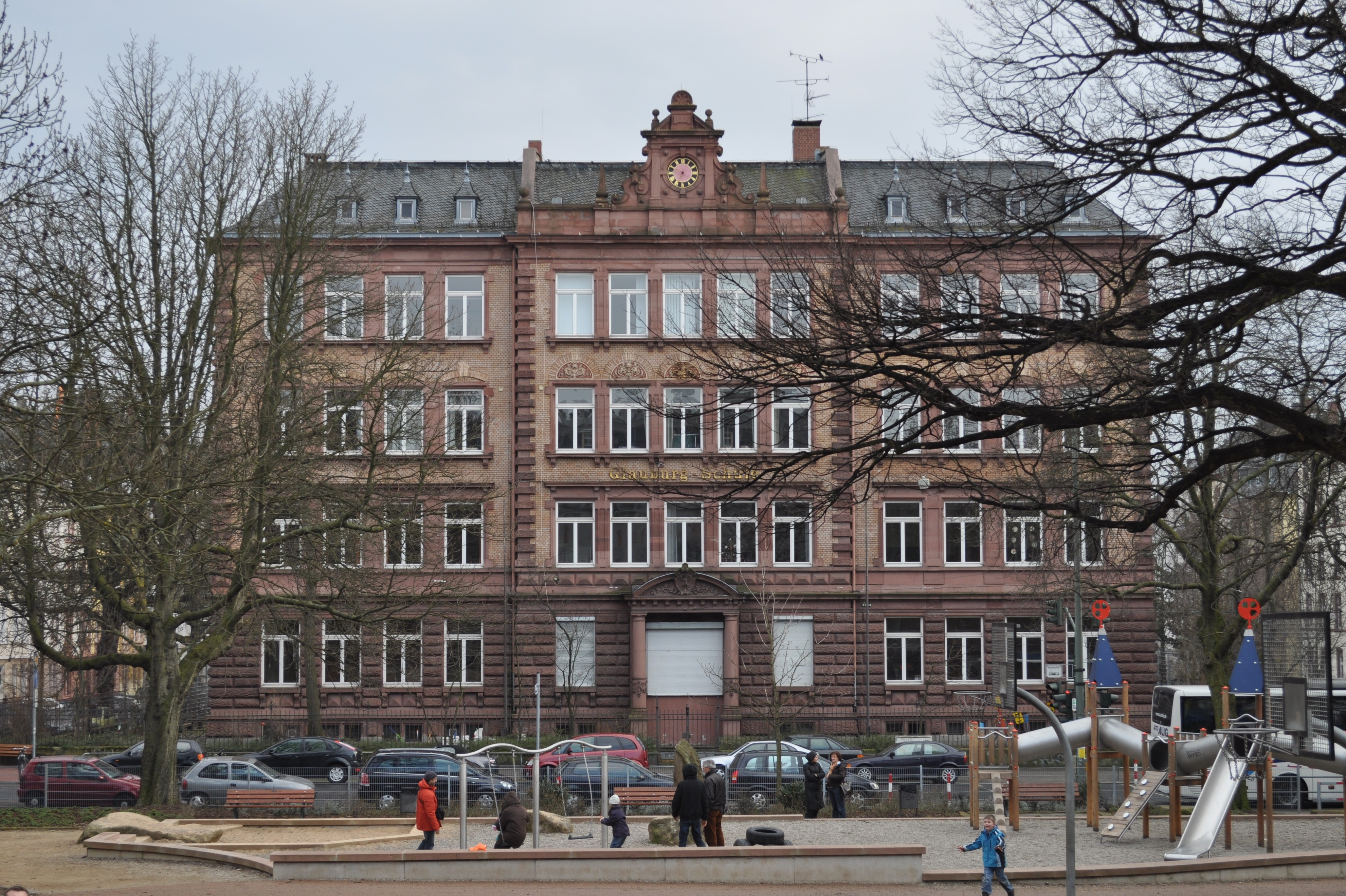 Glauburgschule in Frankfurt am Main